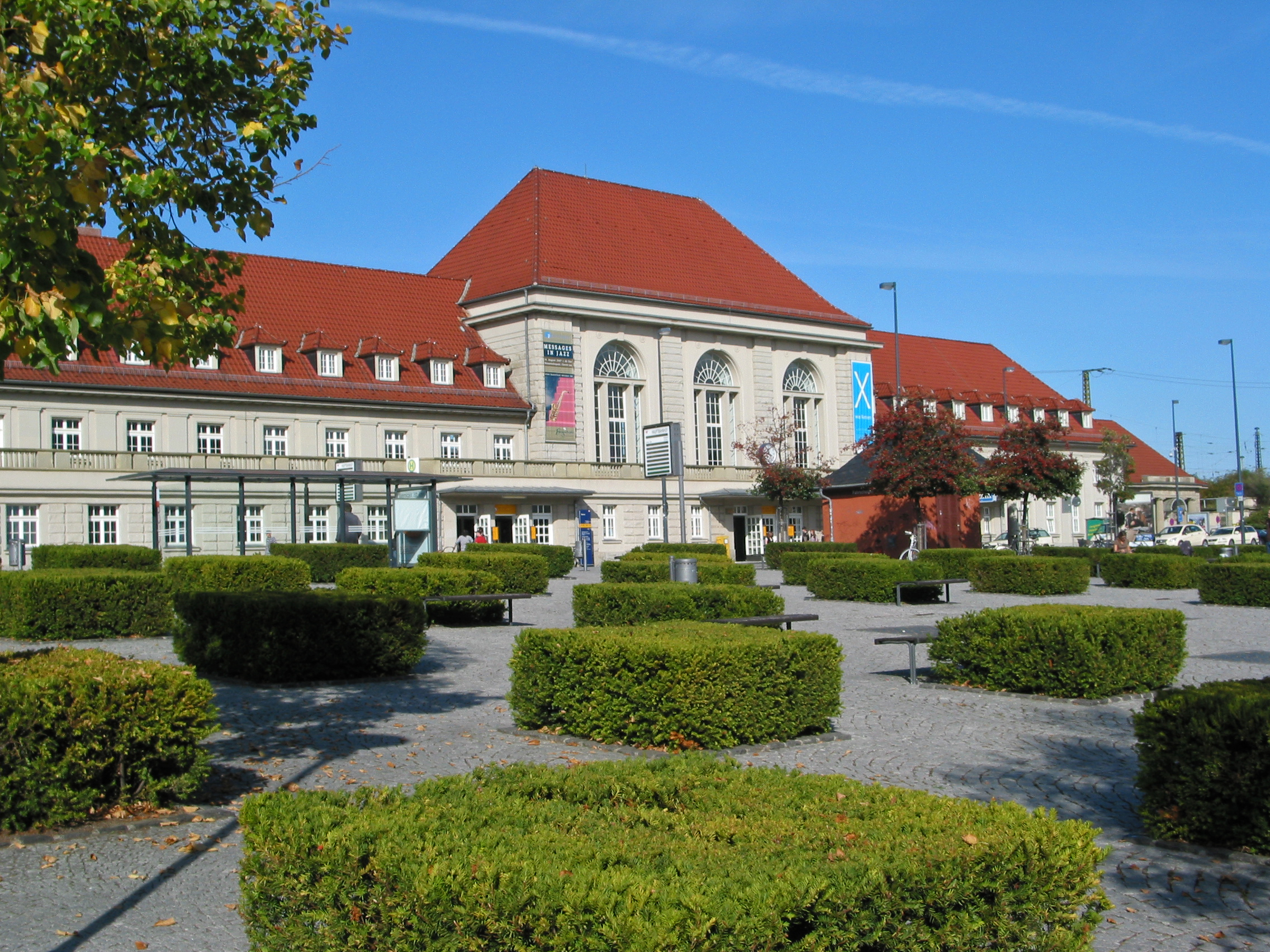 Südansicht des KulturBahnhofs Weimar am August-Baudert-Platz.